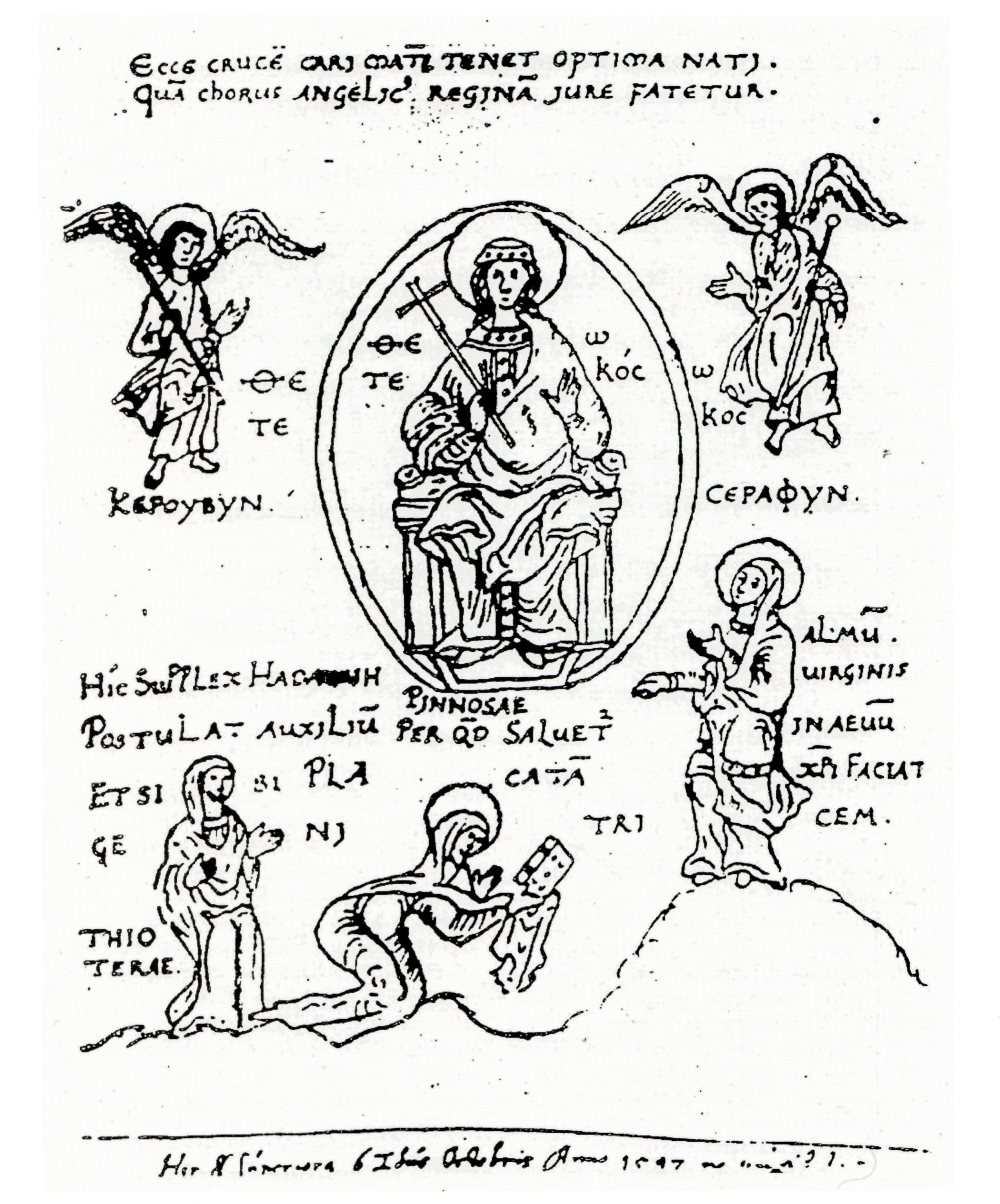 Stifterbild einer Handschrift der Essener Äbtissin Hadwig, Umzeichnung aus dem 17. Jahrhundert eines (verlorenen) Original des 10. Jahrhunderts aus dem Skriptorium der Abtei Fulda